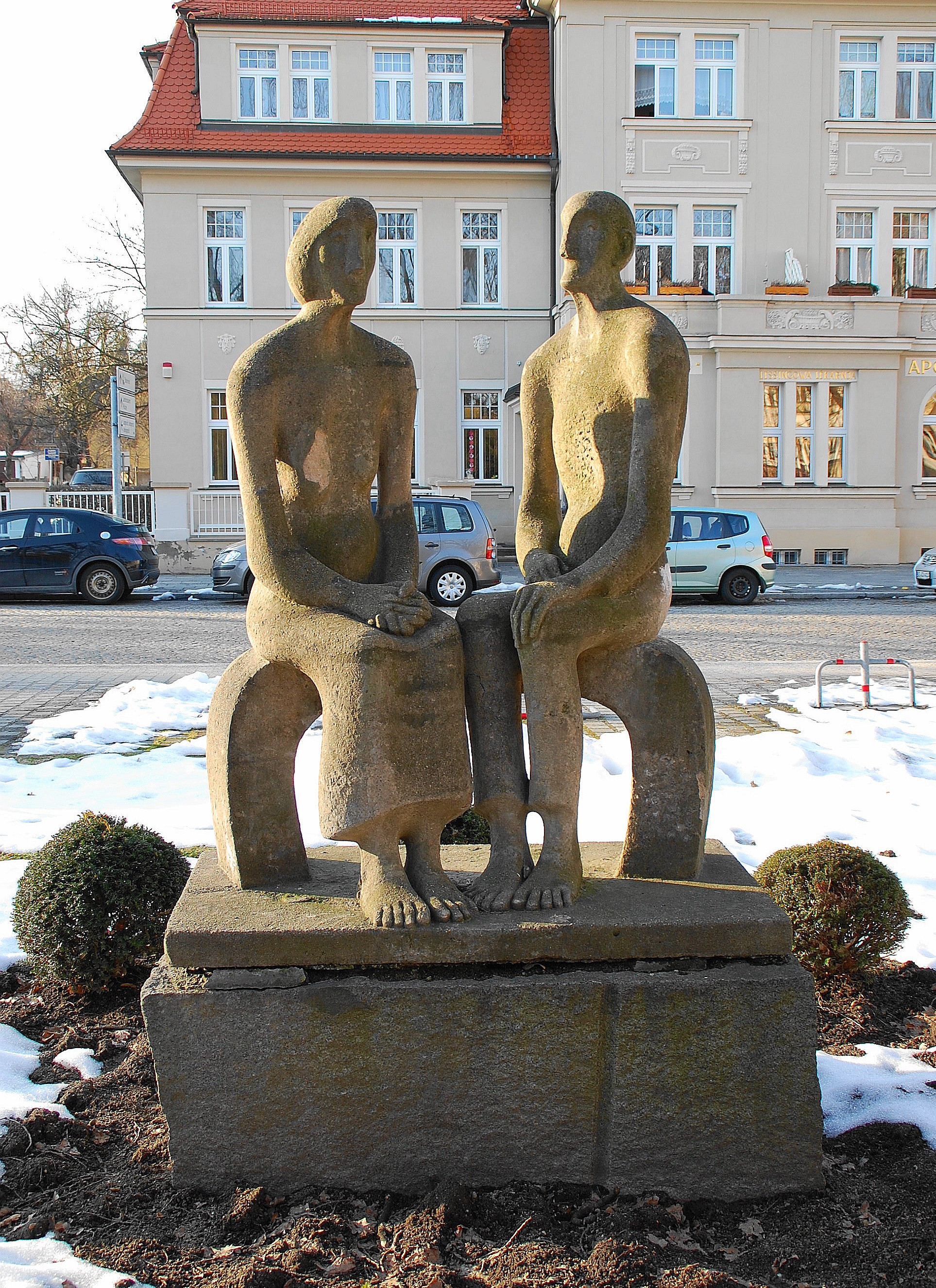 Horst Weiße: Sitzendes altes Paar; 1974 Zement, Park vor dem Amtsgericht Bautzen, Lessingstraße